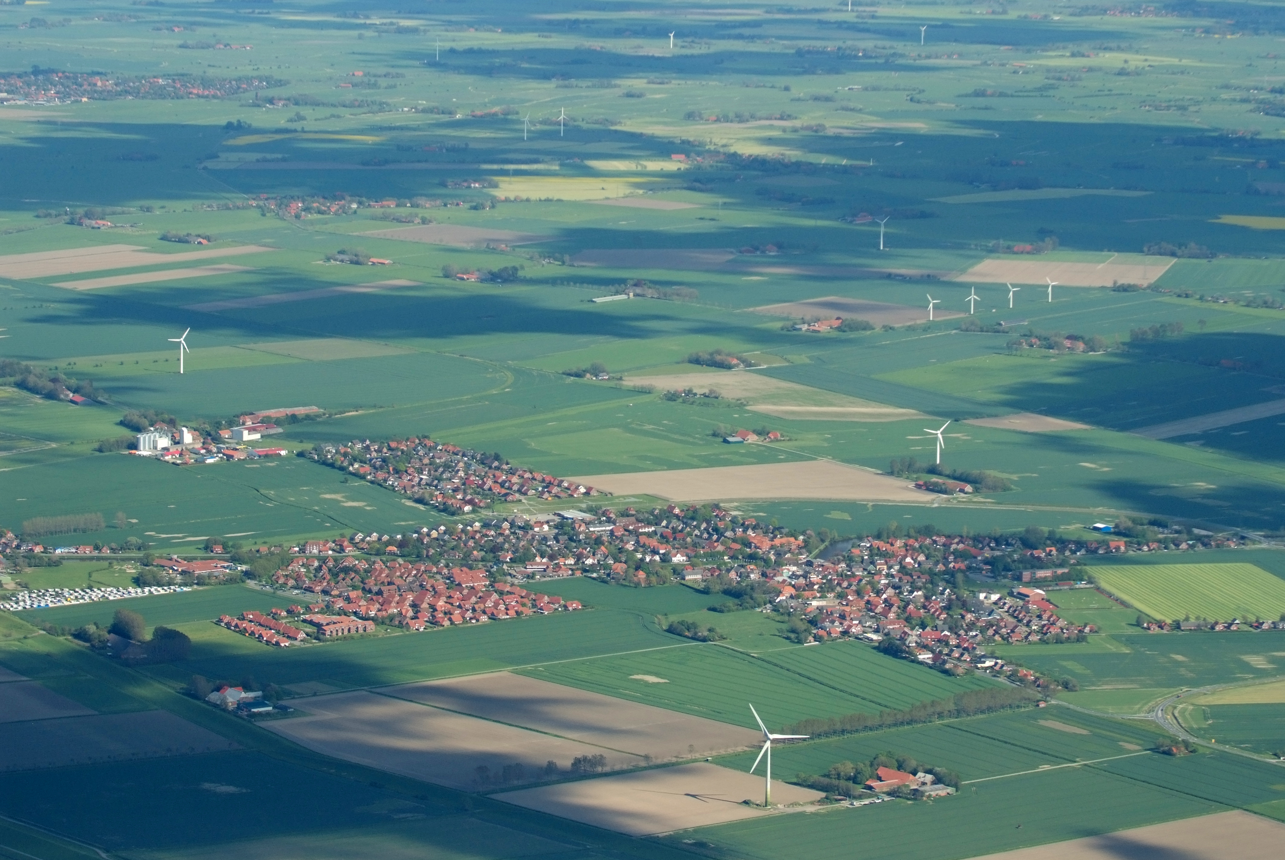 Carolinensiel Fotoflug vom Flugplatz Nordholz-Spieka über Bremerhaven, Wilhelmshaven und die Ostfriesischen Inseln bis Borkum